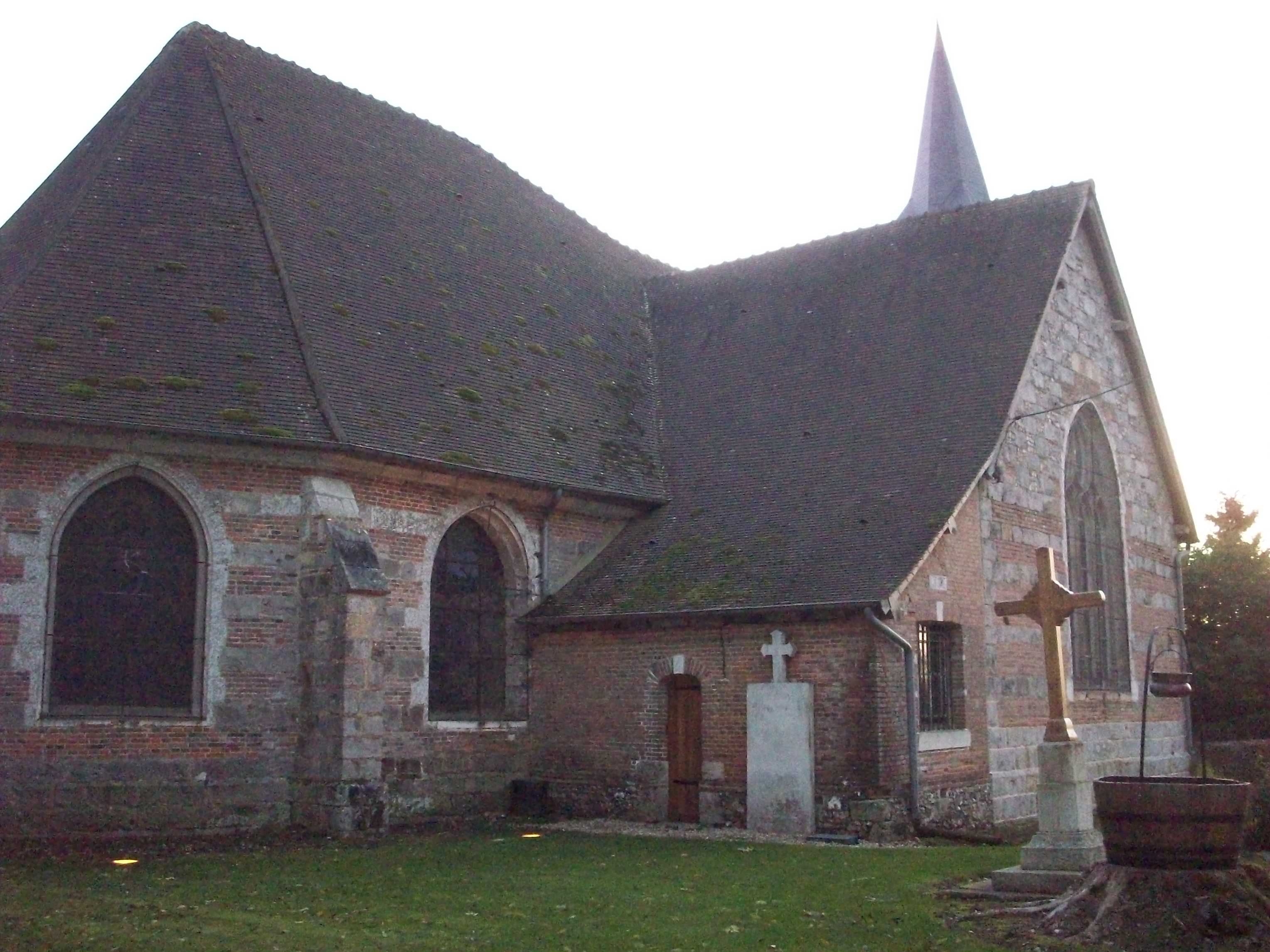 Vue de l'église du Tronquay avec sa sacristie, accolée au transept, et la tombe d'un curé du Tronquay, celle de l'abbé Delarue.